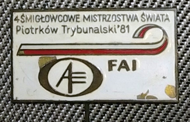 This photograph is in the public domain because according to the Art. 3 of copyright law of March 29, 1926 of the Republic of Poland and Art. 2 of copyright law of July 10, 1952 of the People's Republic of Poland, all photographs by Polish photographers (or published for the first time in Poland or simultaneously in Poland and abroad) published without a clear copyright notice before the law was changed on May 23, 1994 are assumed to be in the public domain in Poland. This work is in the public domain in the United States because it meets three requirements: it was first published outside the United States (and not published in the U.S. within 30 days), it was first published before 1 March 1989 without copyright notice or before 1964 without copyright renewal or before the source country established copyright relations with the United States, it was in the public domain in its home country (Poland) on the URAA date (1 January 1996). To uploader: Please provide where and when the image was first published.